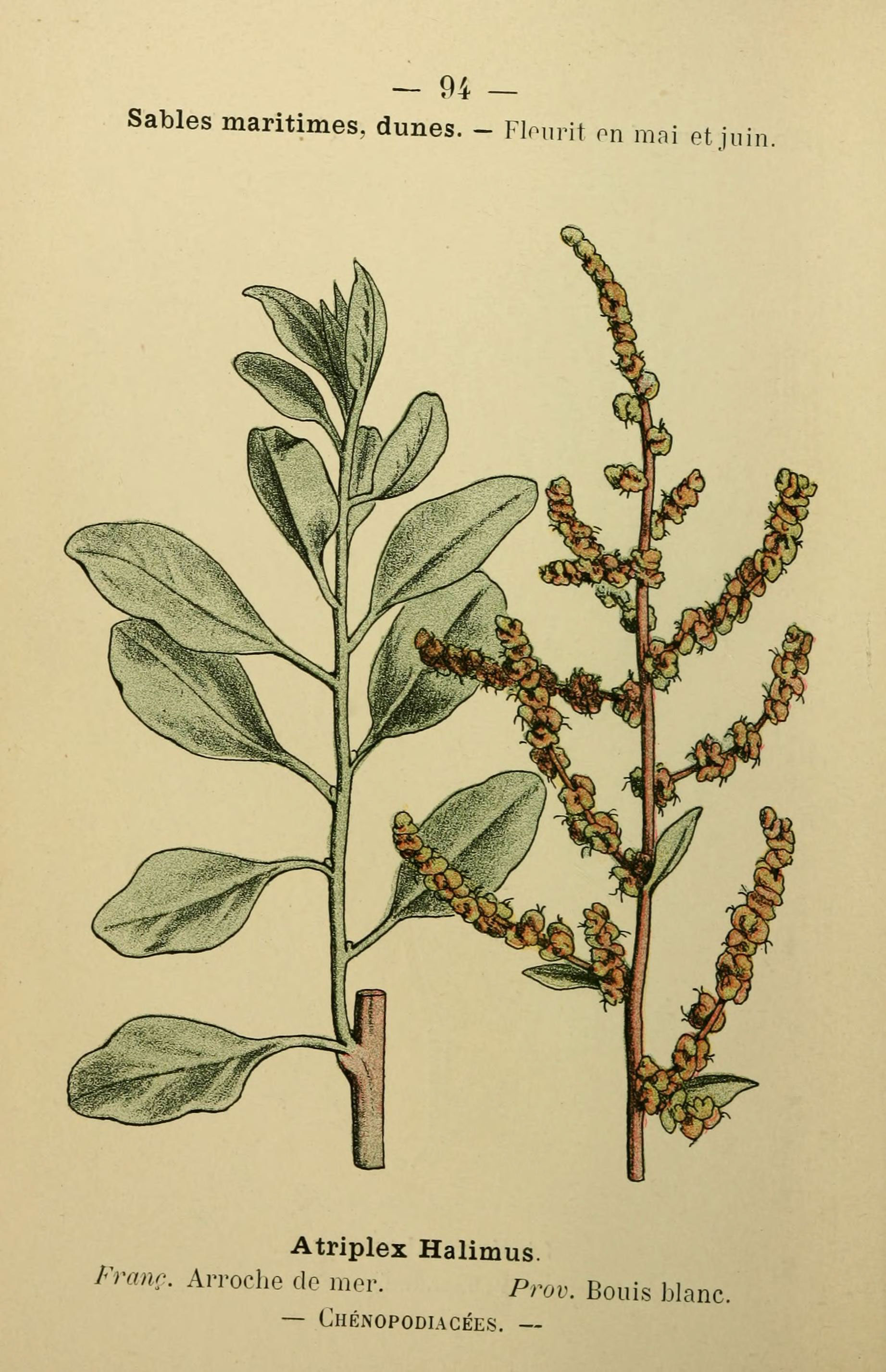 94 - Sables maritimes, dunes. - Flourit on mni et juin. Atriplex Halimus. Franc. Arroche do mor. p,.,,. Bonis blanc. — Chénopodiacées. —